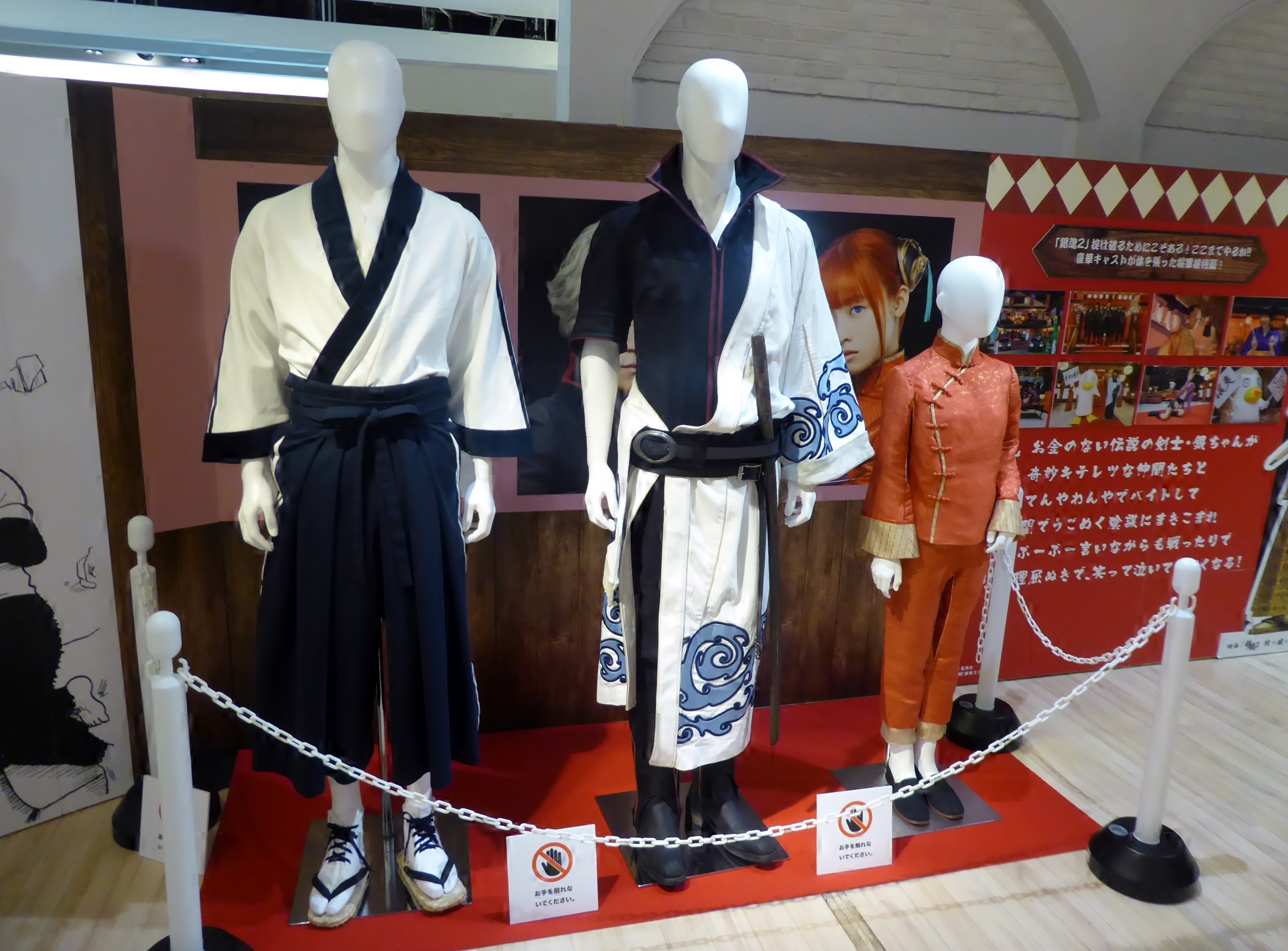 『銀魂2 掟は破るためにこそある』に於いて小栗旬氏、菅田将暉氏、橋本環奈氏が着用した衣装を撮影。